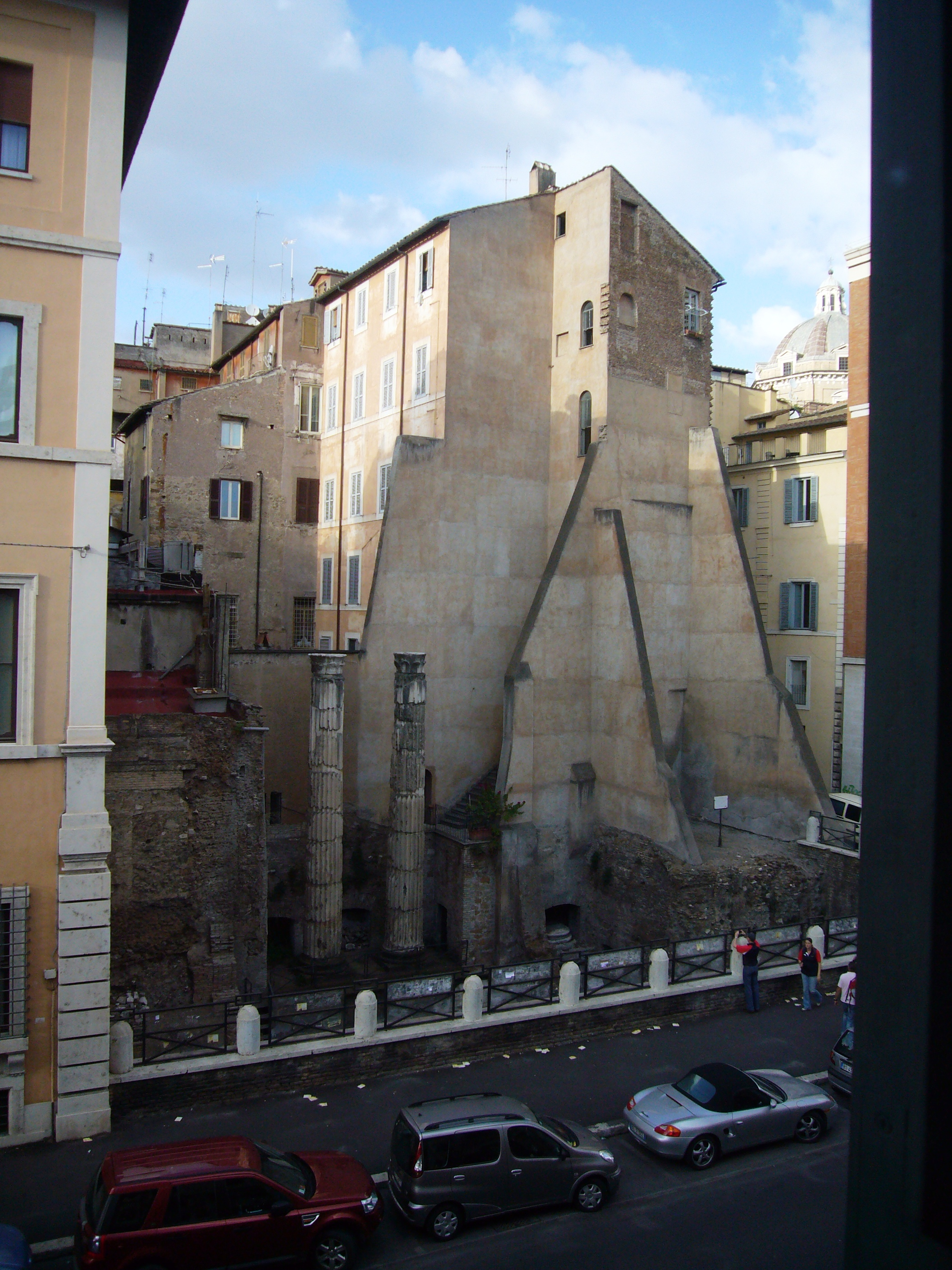 Roma, scavi del tempio delle Ninfe alla Porticus Minucia (via delle Botteghe oscure)